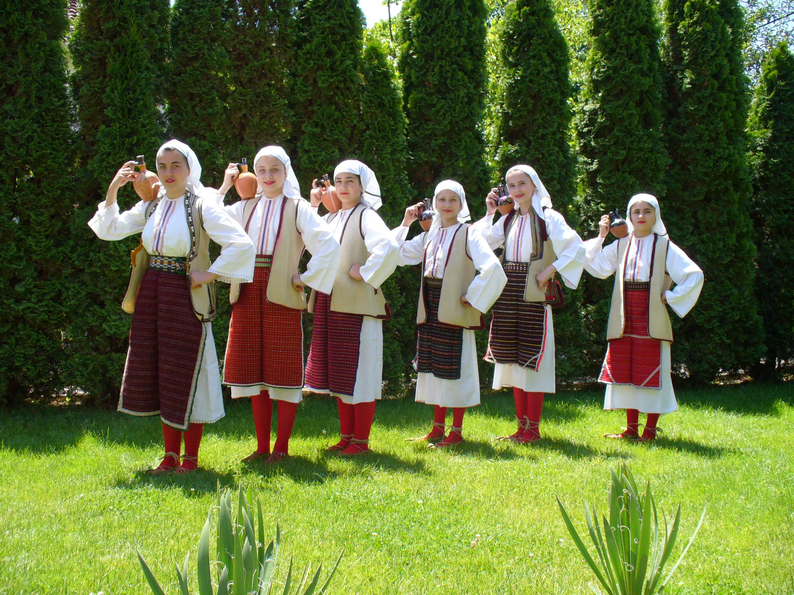 со две стомни шарени